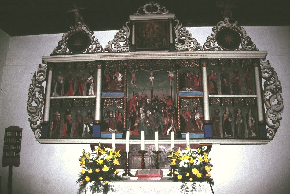 Enge Kirke i Sydslesvig. Altertavle